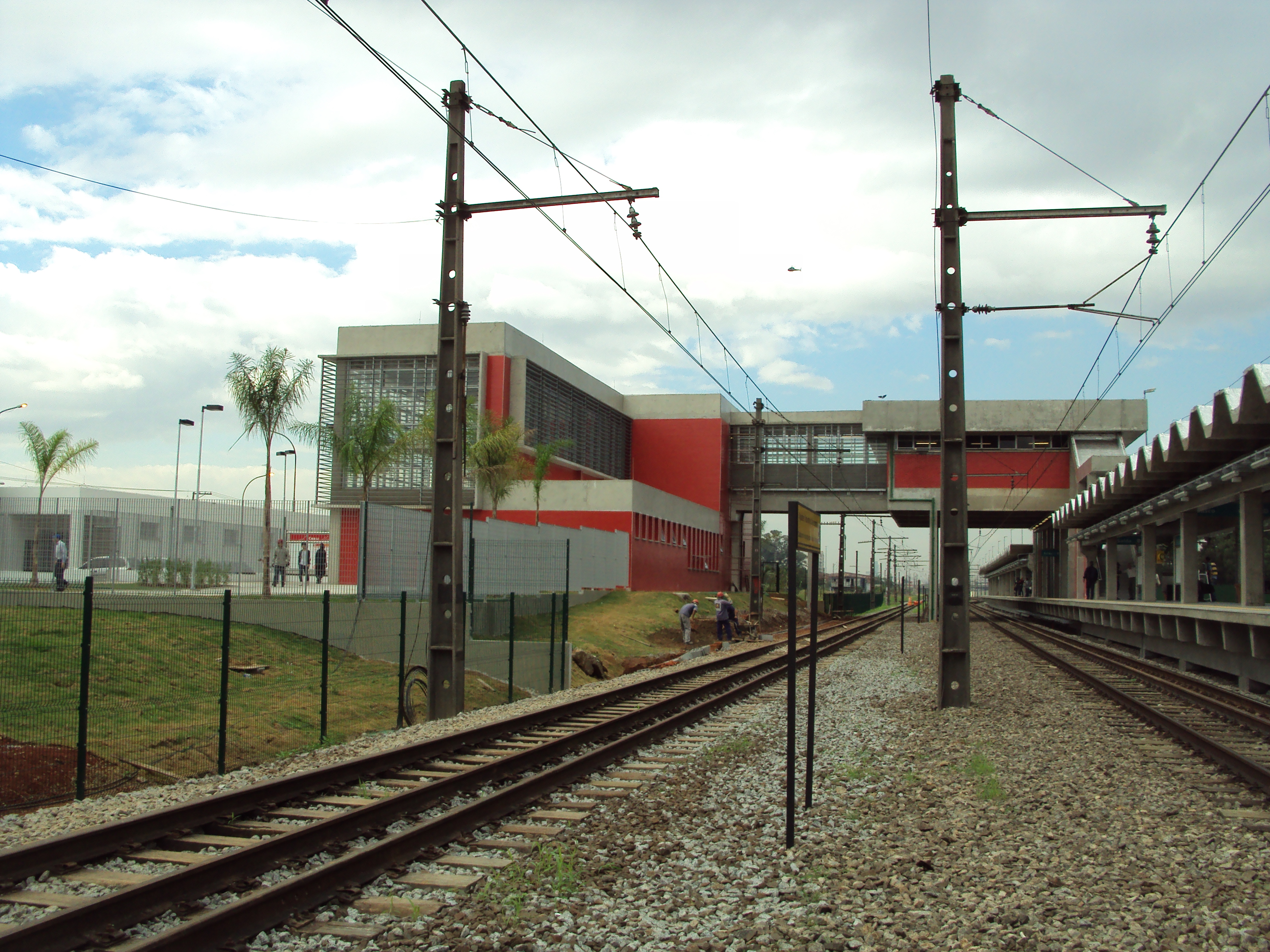 Estação CEASA - CPTM